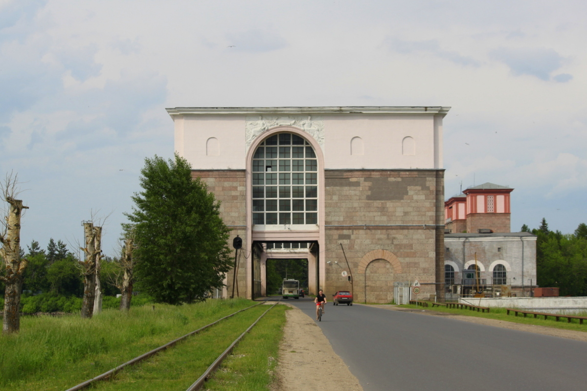 Водосбросная плотина Рыбинской ГЭС